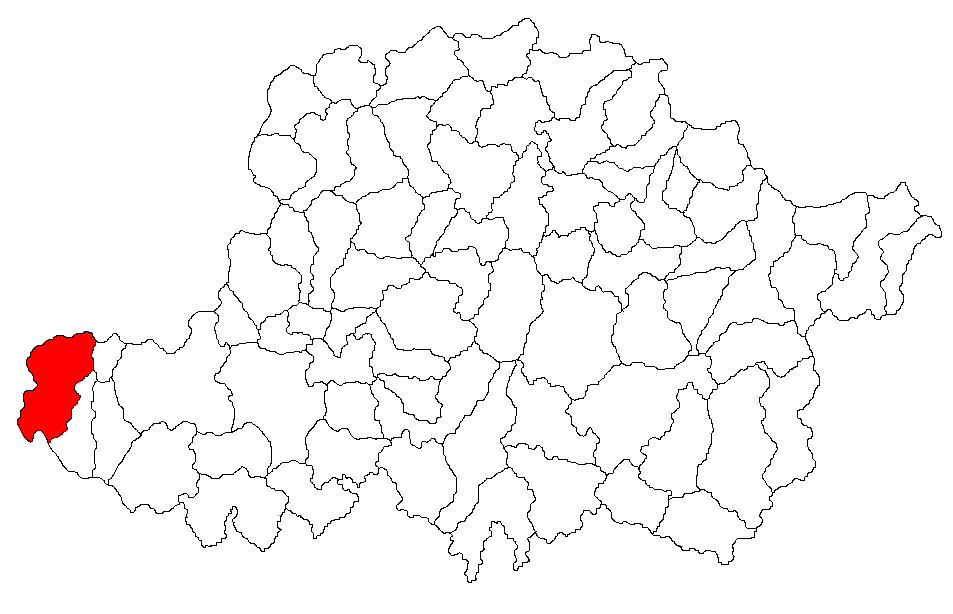 Categorie:Hărţi ale judeţului Arad